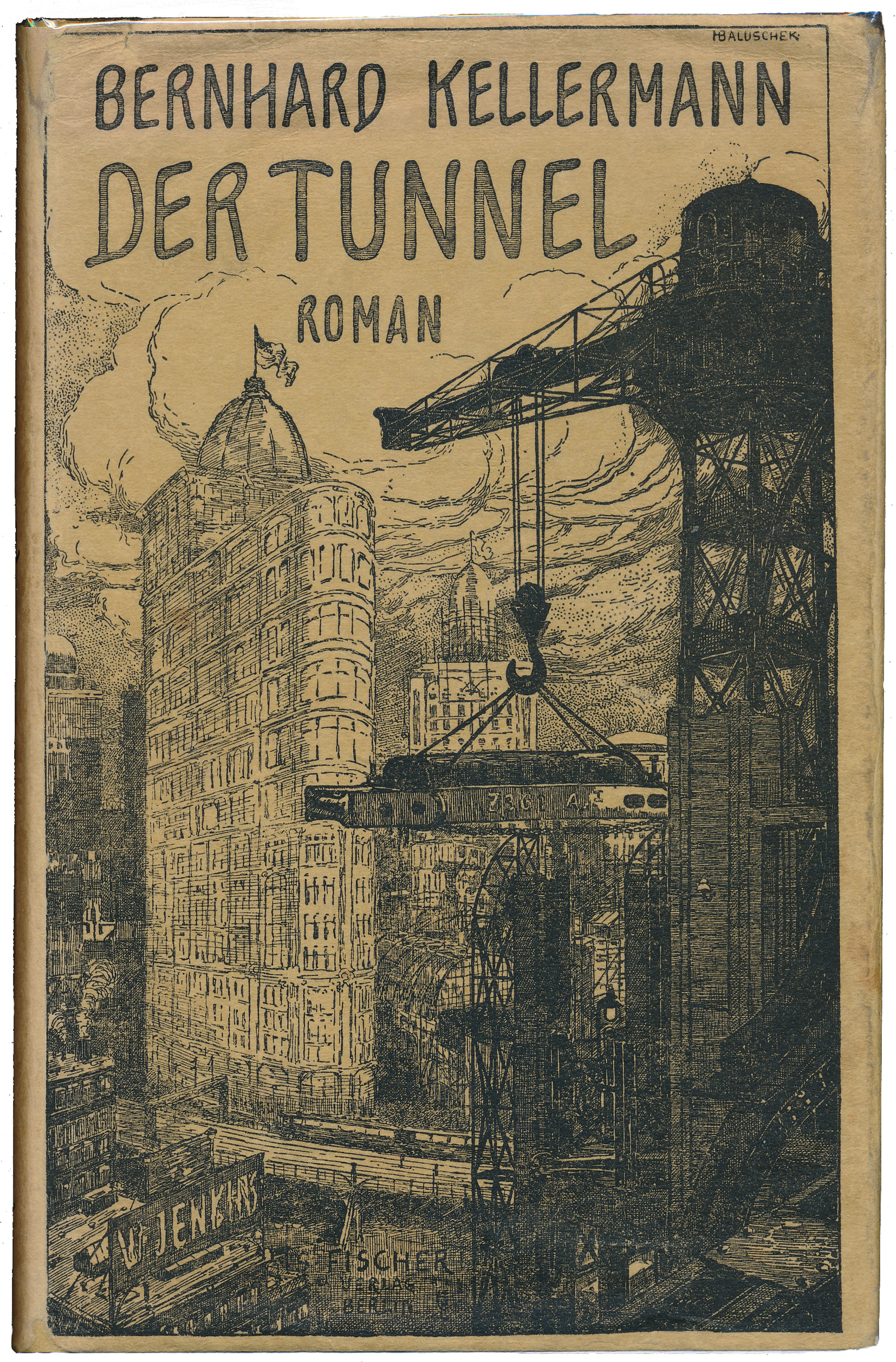 Umschlag der Originalausgabe 1913